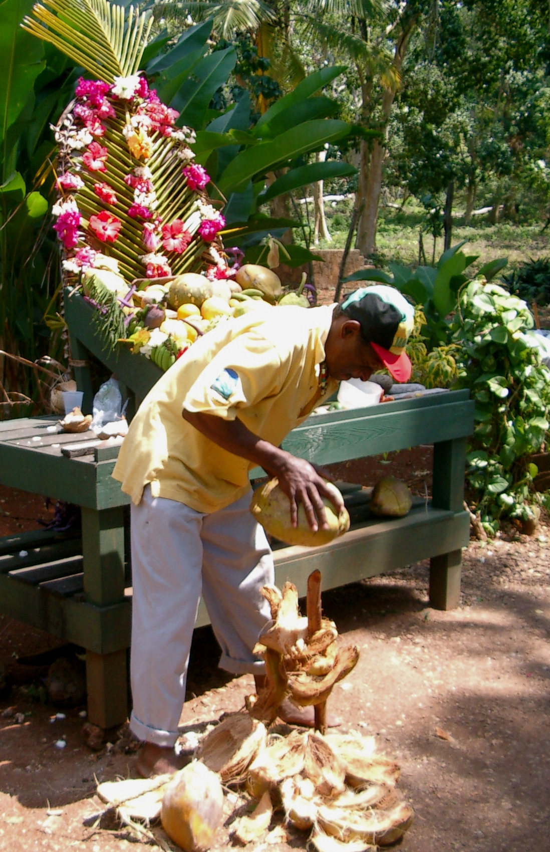 Jamaikaner beim Opmaache vu Kokosnëss